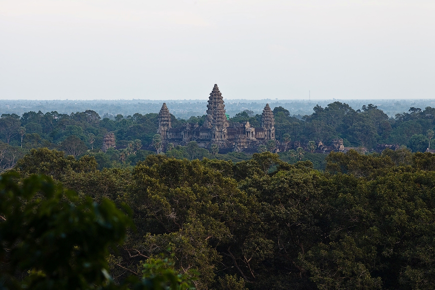 Вид на Angkor Wat с горы Phnom Bakheng.